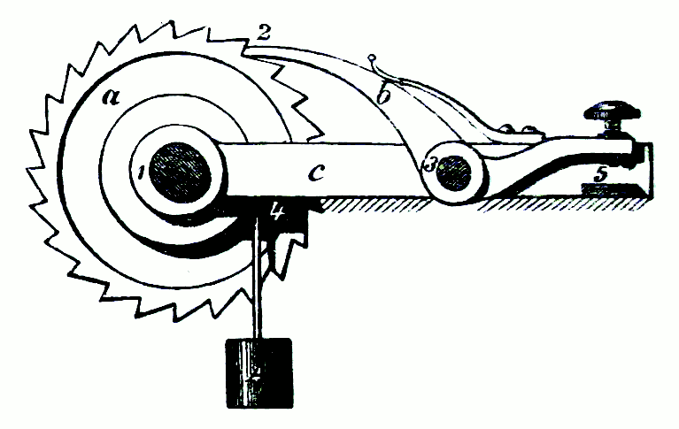 Figure 2, cropped from File:Kultur och teknik 4.jpg.